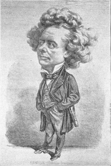 Caricature de Joseph-Isidore Samson, comédien, paru dans le dictionnaire des comédiens de Lyonnet (1904)